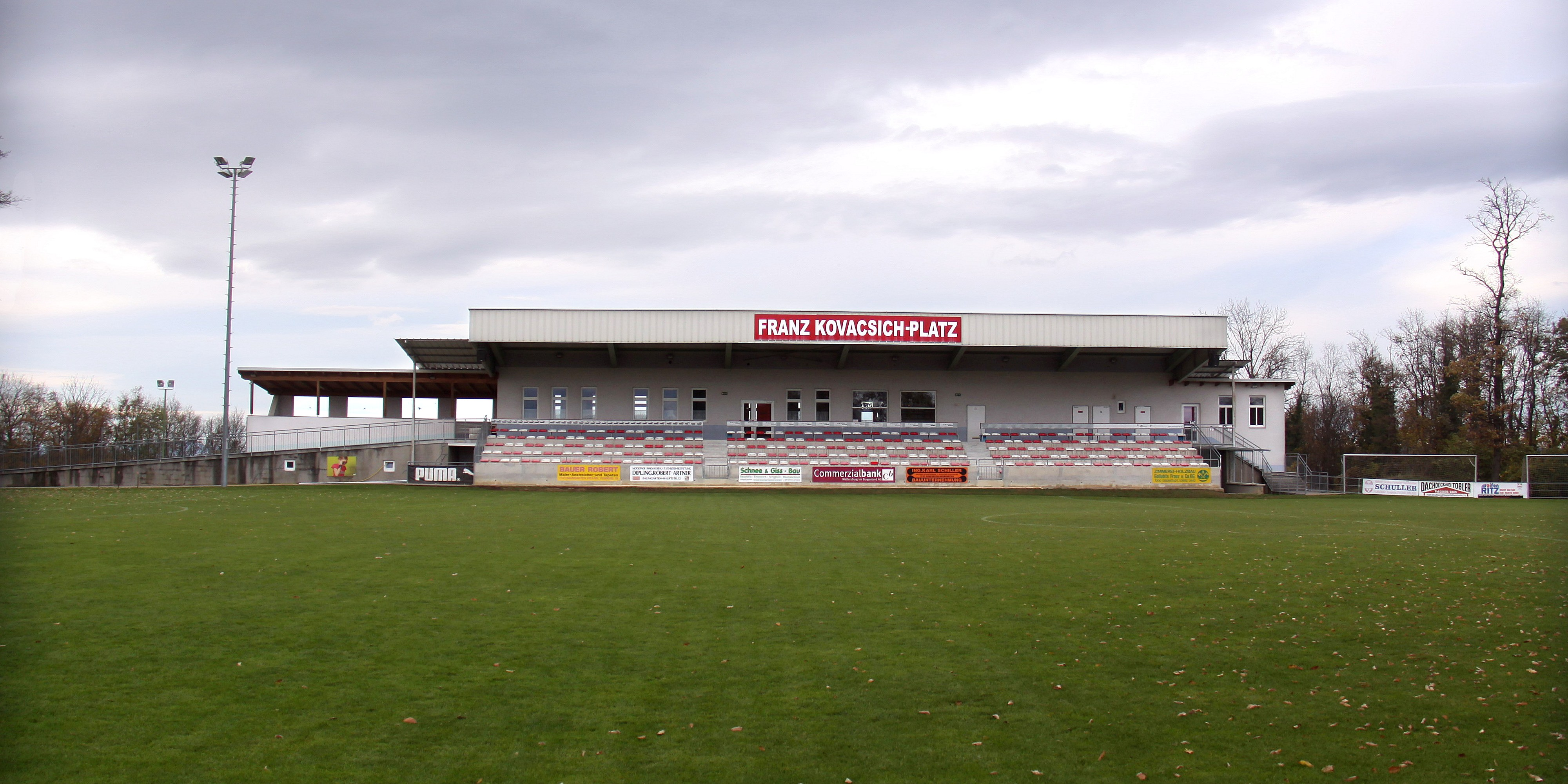 Franz Kovacsich-Stadion des ASK Baumgarten in Baumgarten im Burgenland.